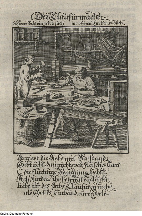 Original image description from the Deutsche Fotothek Ständebuch & Beruf & Handwerk & Buchschließe & Verschluss & Gürtler